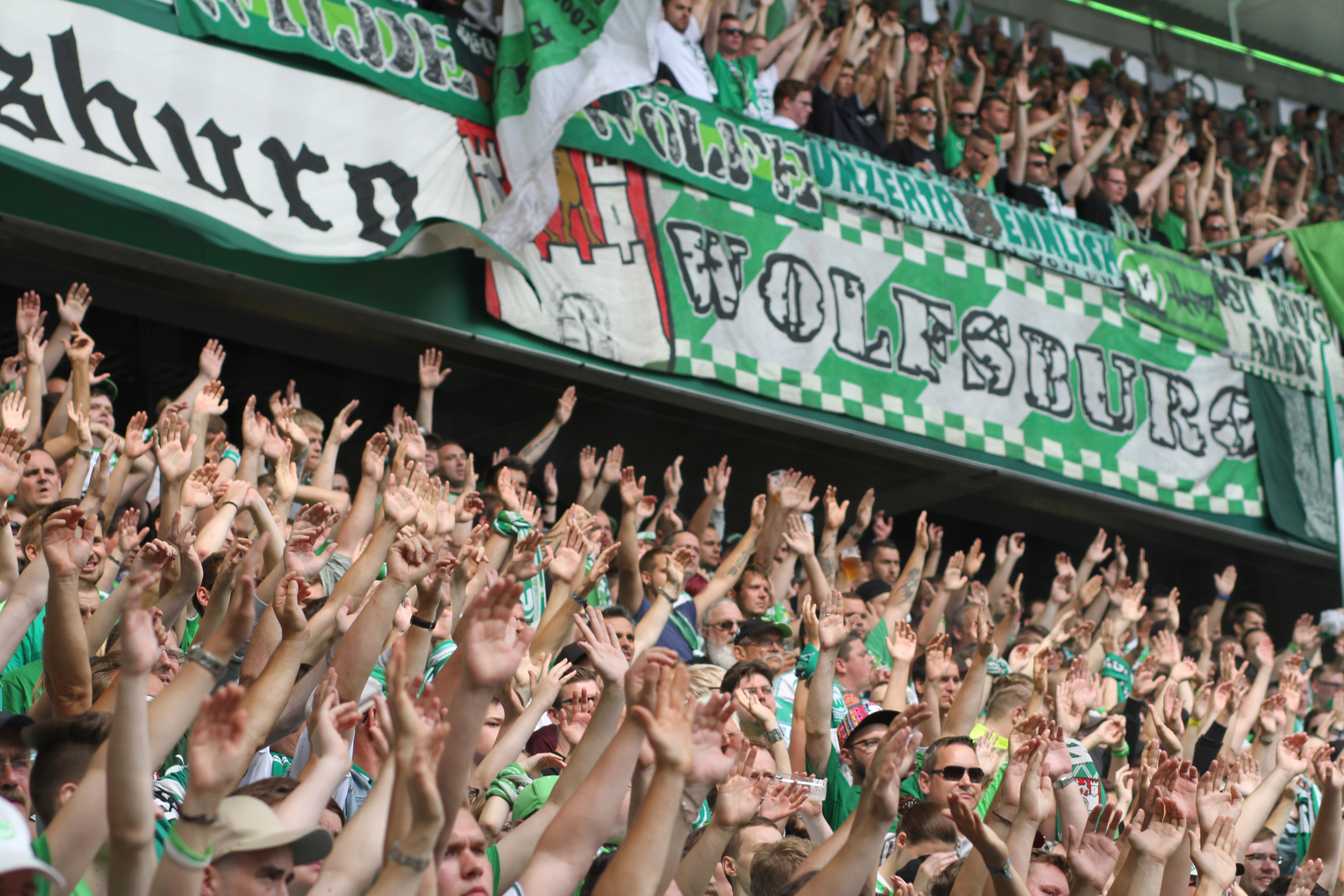 Besucher der Volkswagen Arena